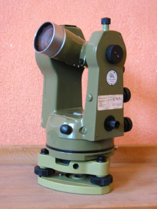 Theodolit K1-S or K1-M von Kern-Aarau